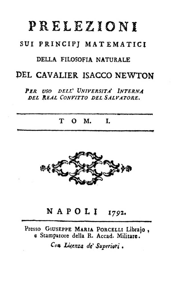 Prelezioni sui principj matematici della filosofia naturale del cavalier Isacco Newton per uso dell'Università interna del Real convitto del Salvatore. Tom. 1. - Napoli : presso Giuseppe Maria Porcelli librajo, e stampatore della R. Accad. militare, 1792. - xxiv, 335 p., 7 c. di tav. : ill. ; 8º .